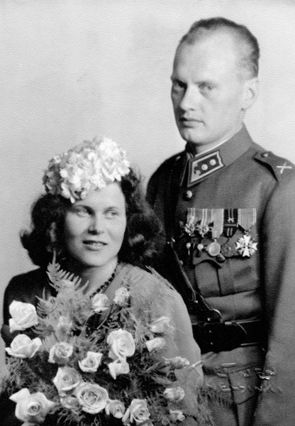 Taideopiskelija Eila Hiltunen ja kadetti Otso Pietinen vihittiin 18.6.1944 puolen vuoden seurustelun jälkeen. Eila oli 21-vuotias, Otso häntä kuusi vuotta vanhempi leskimies ja pienen tyttären isä.